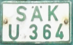 Bad Säckingen — Grünes Kennzeichen „SÄK“ an einem Deutz-Traktor (Kennzeichen wird nicht mehr vergeben) *GPS data may be inaccurate. *EXIF data regarding date and time may be inaccurate.